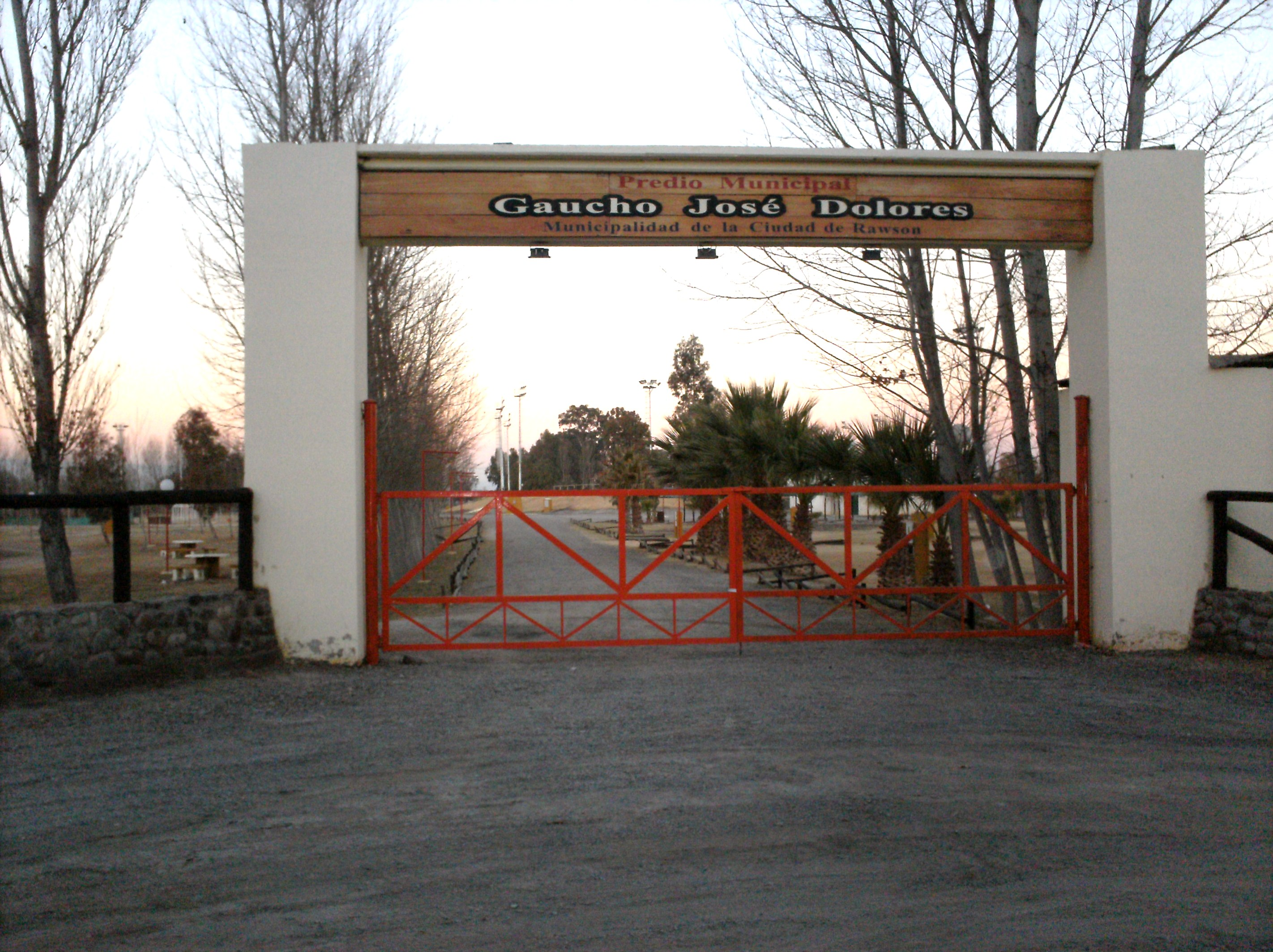 el predio ferial municipal en el medanito